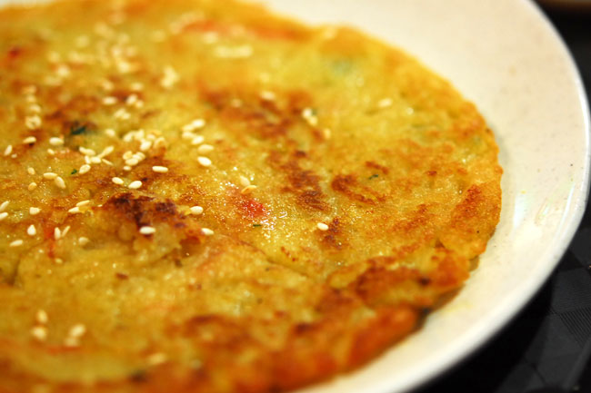 Gamjajeon, Korean potato pancake